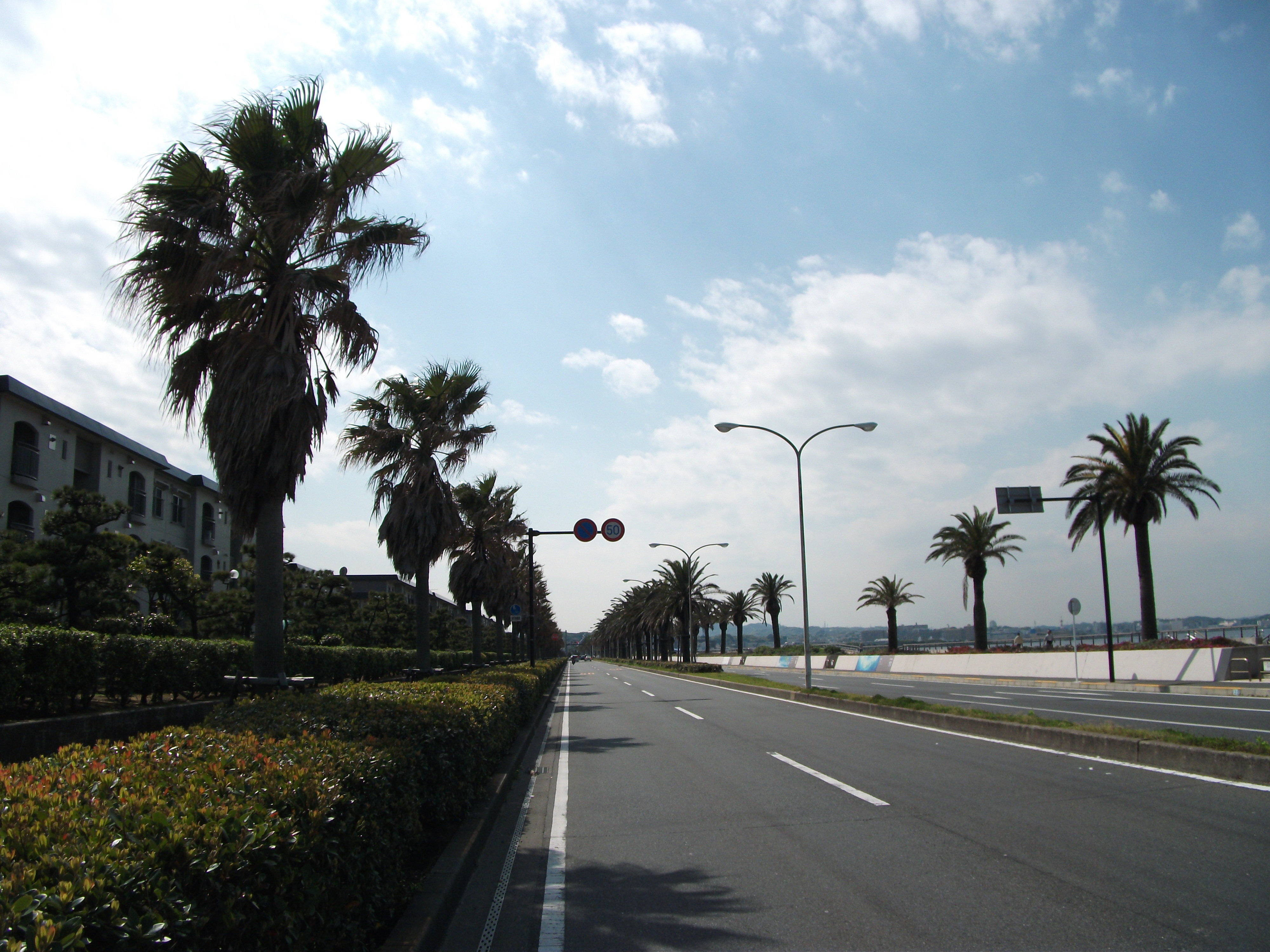 横須賀市馬堀海岸の国道16号